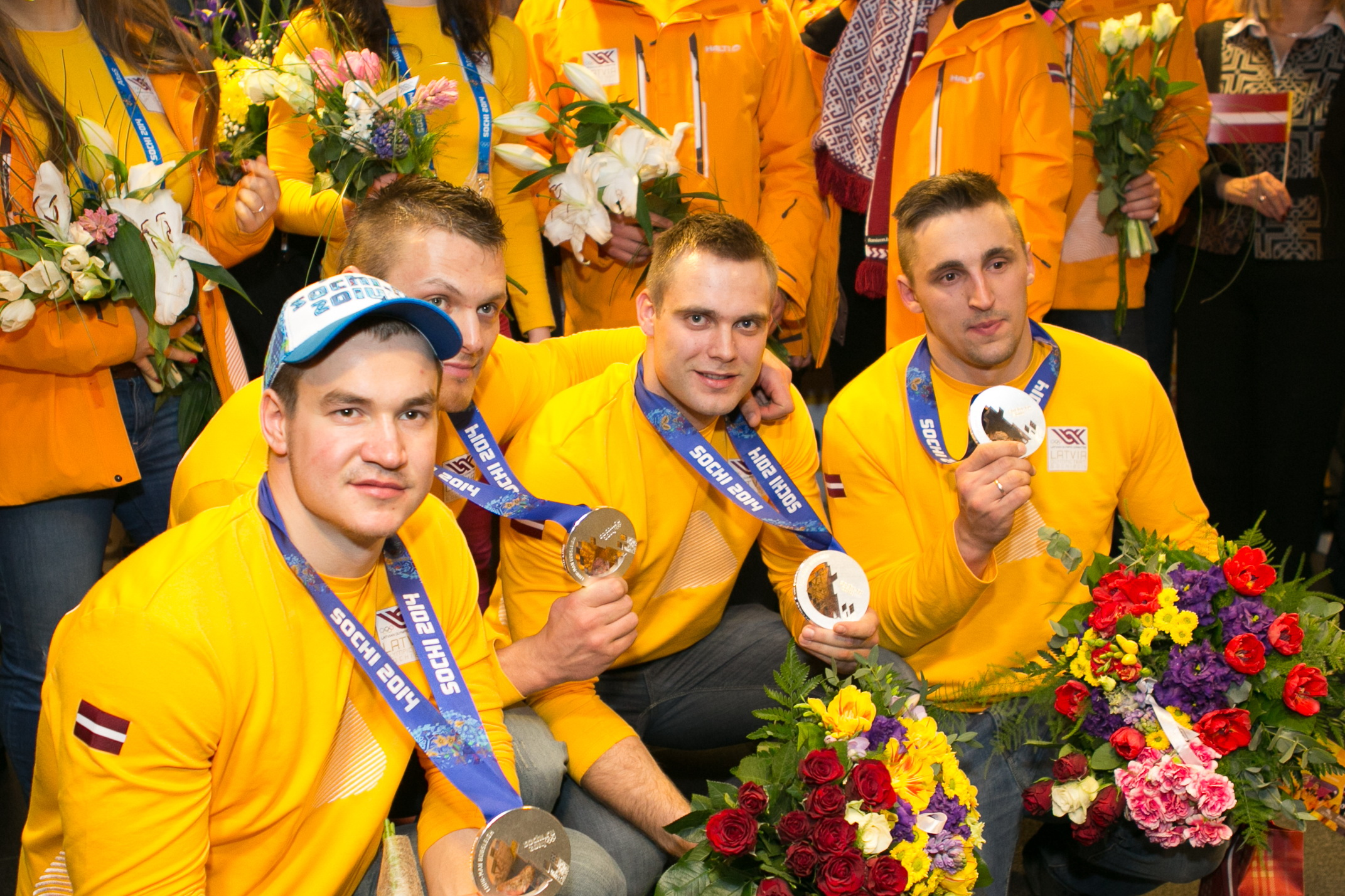 Latvijas Olimpiskās komandas sagaidīšana lidostā "Rīga"